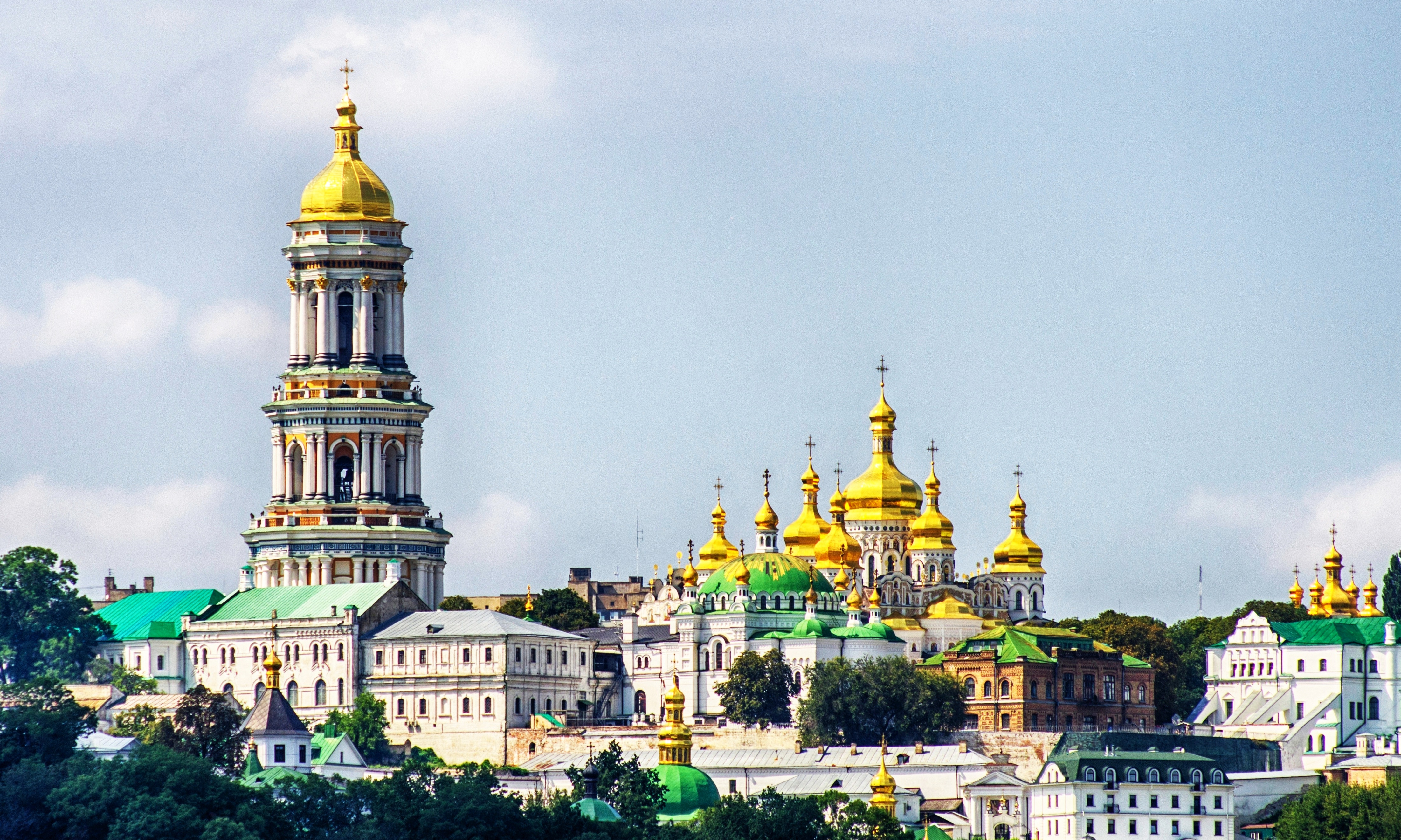 Комплекс Києво-Печерської лаври (Національний заповідник Києво-Печерська Лавра), Київ, Лаврська вул., 9, 15